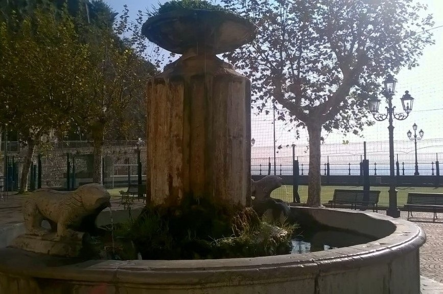 La fontana dei leoni, Minori (SA)